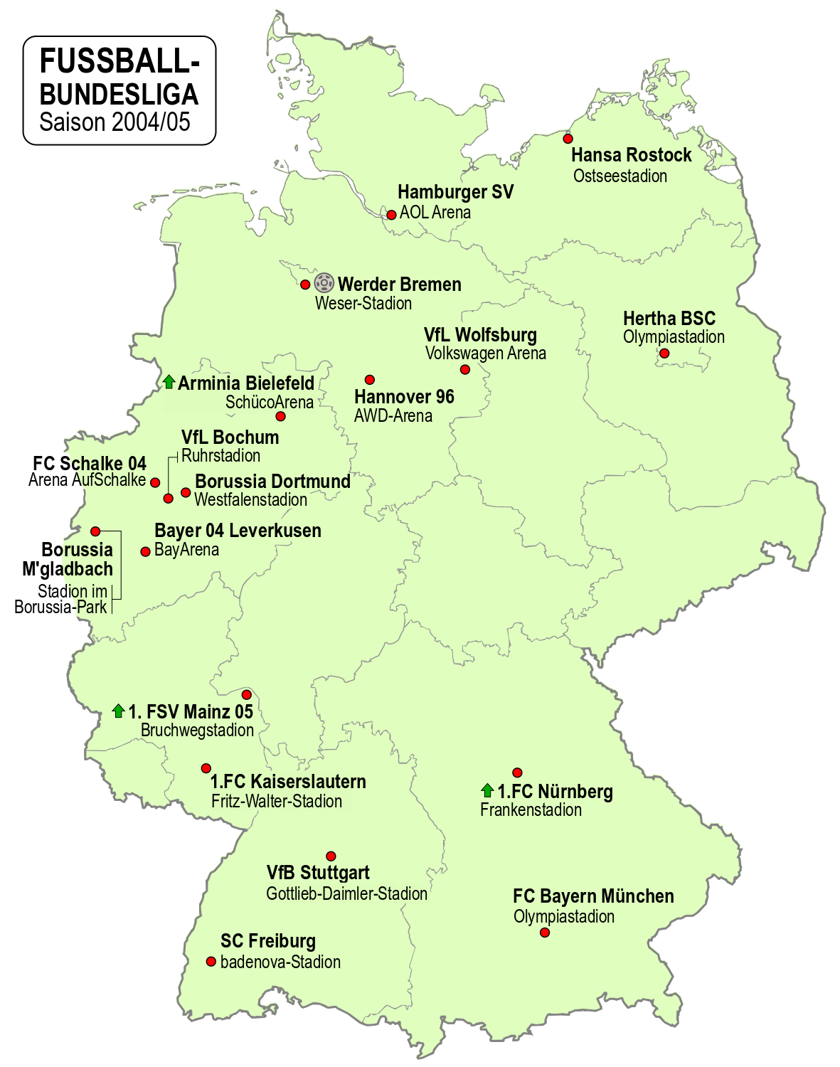 Karte der Vereine der Fussball-Bundesliga-Saison 2004/05